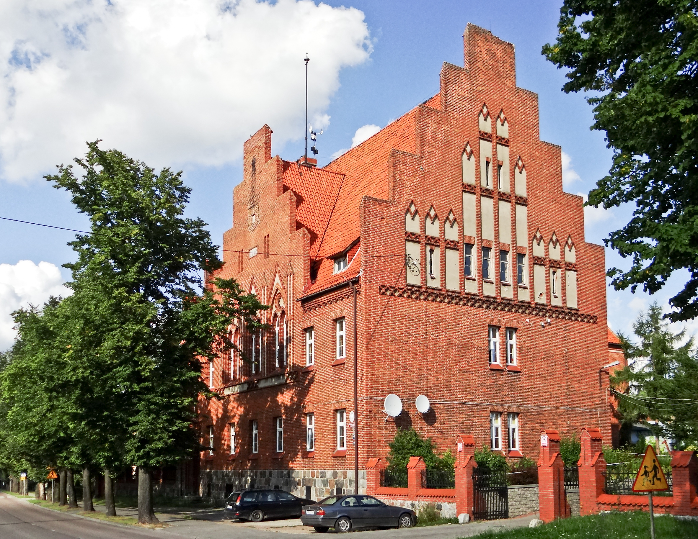 Pasym, ul. Dworcowa 29